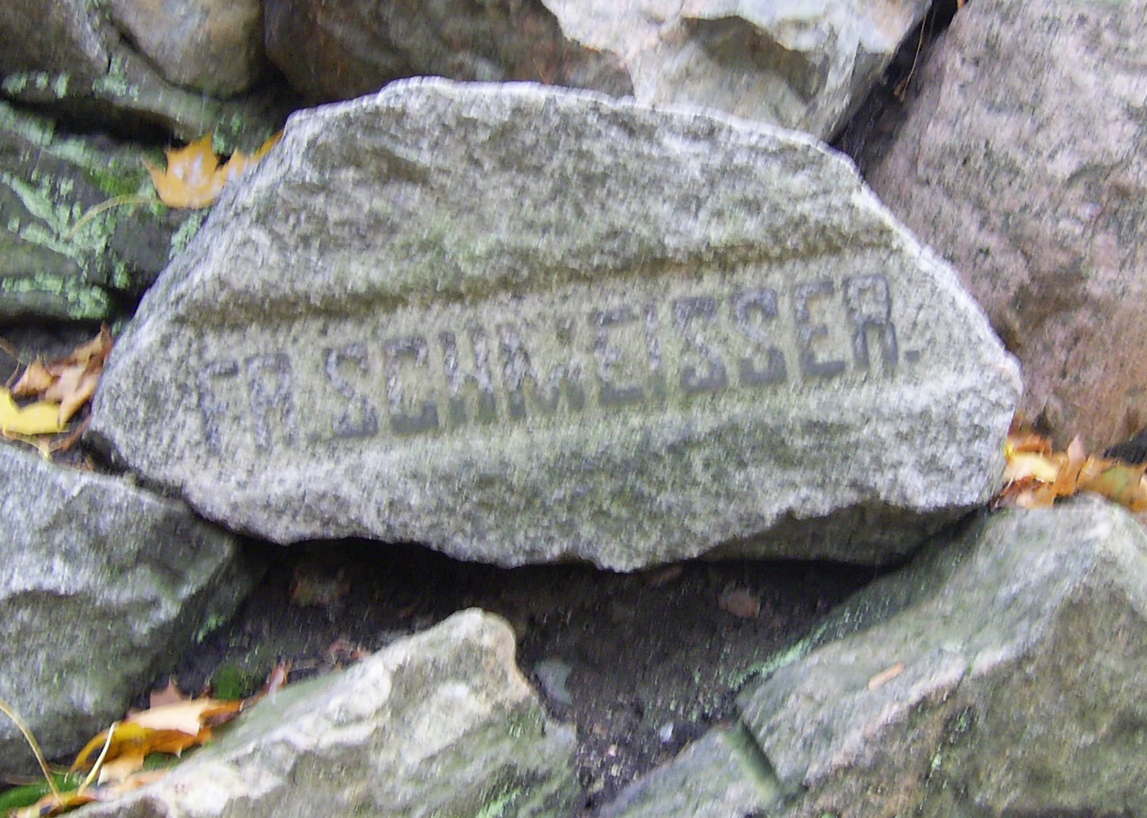 Denkmal Den Schöpfern dieser Anlagen in Frankfurt (Oder) - Hier der Gedenkstein für ??